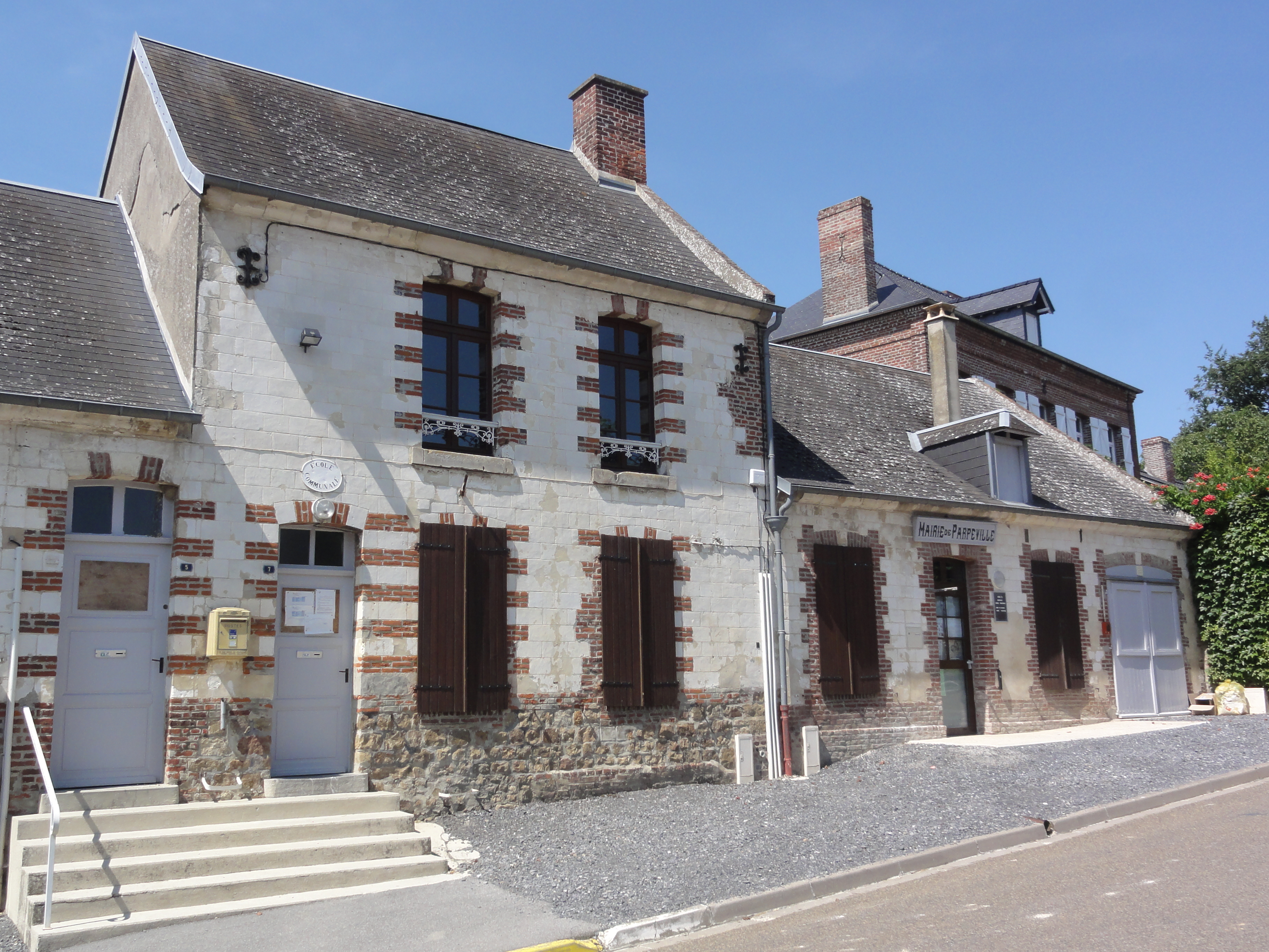 Parpeville (Aisne) mairie et école